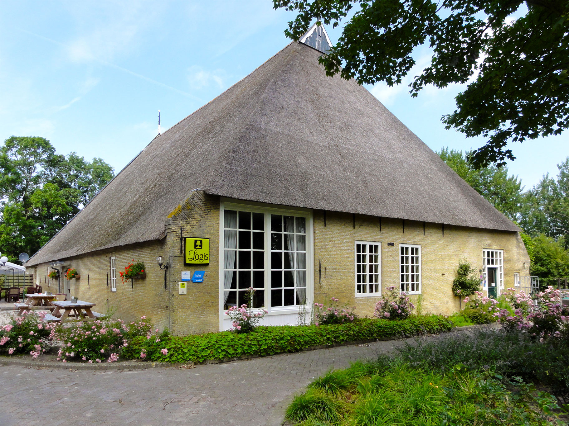 Kop-hals-rompboerderij in gele Friese stee op terrein voormalige Liauckemastate